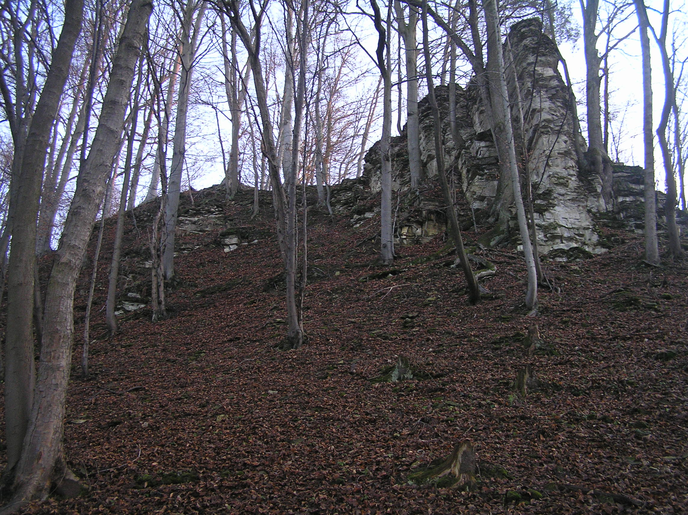 The castle Hrádníky, Czech Republic